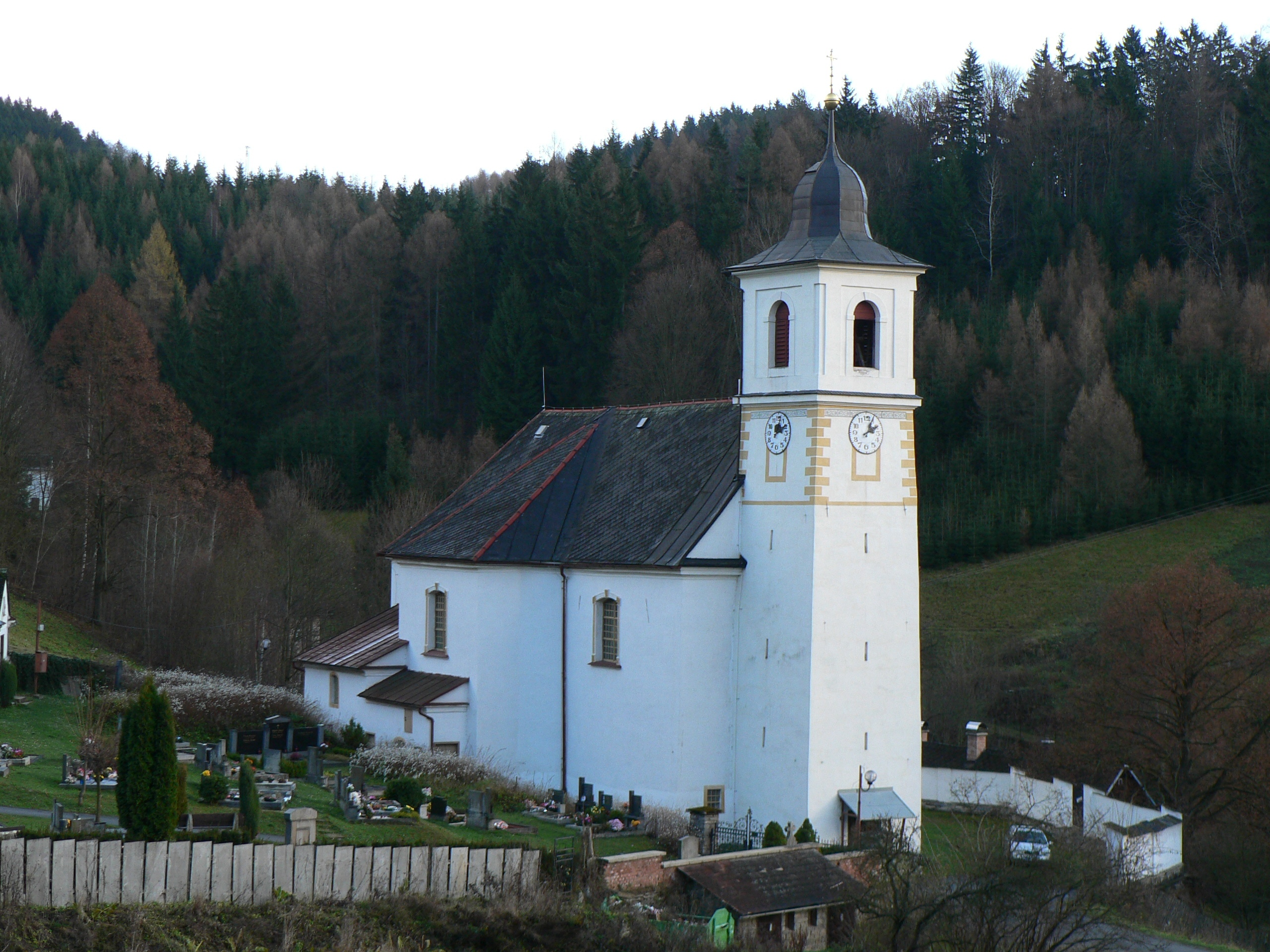 Kostel svatého Mikuláše (Hanušovice)